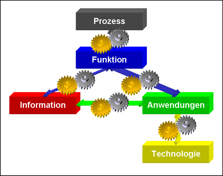 PFITA-Metamodell